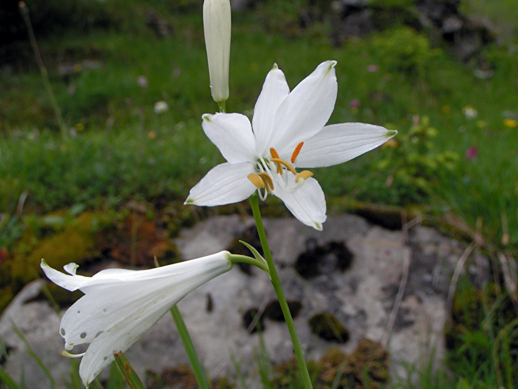 Paradiseum liliastrum